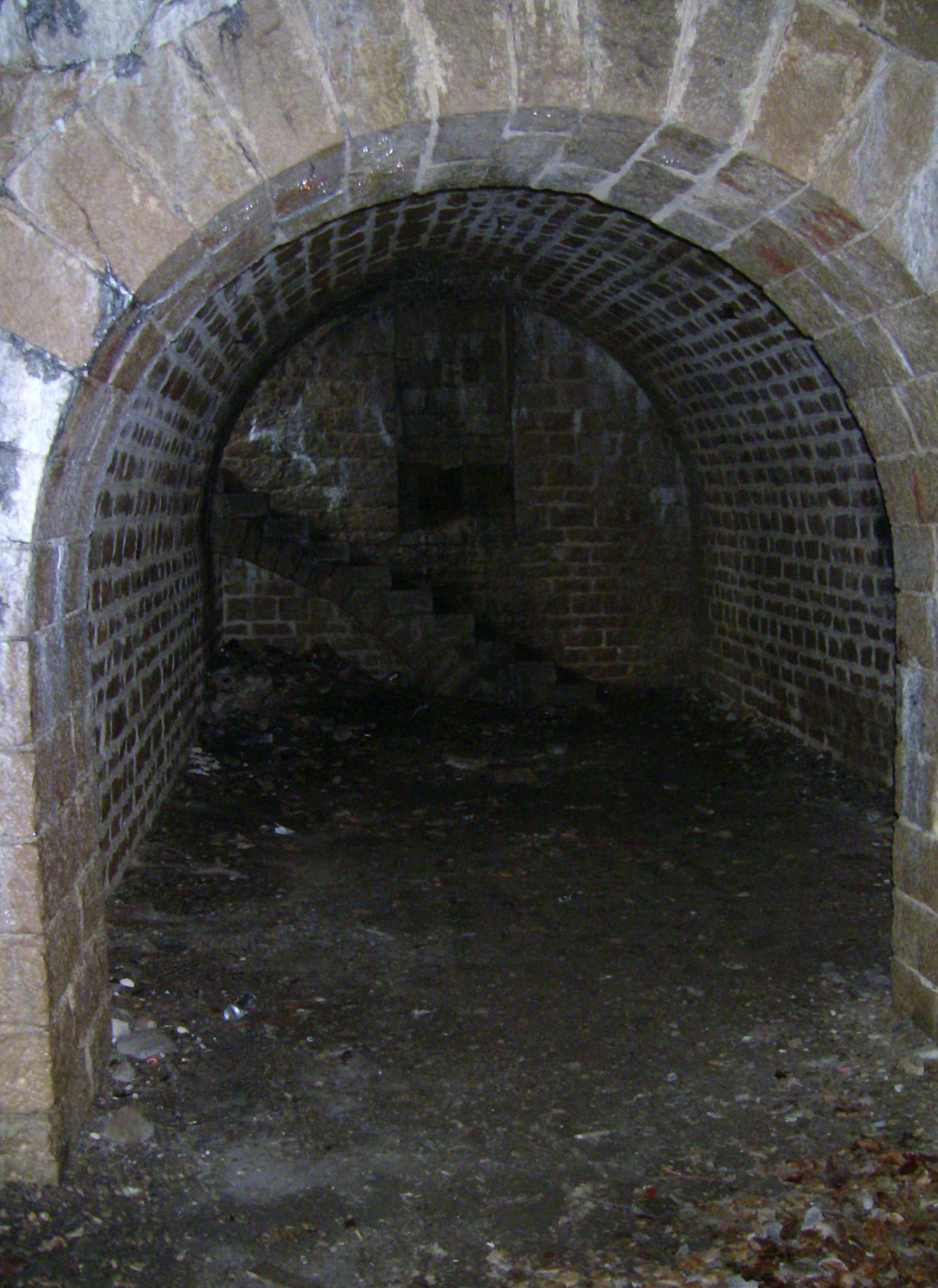 Exemple de l'aspect intérieur de la caserne annexe sud-ouest du fort de Planoise à Besançon (Doubs, France).